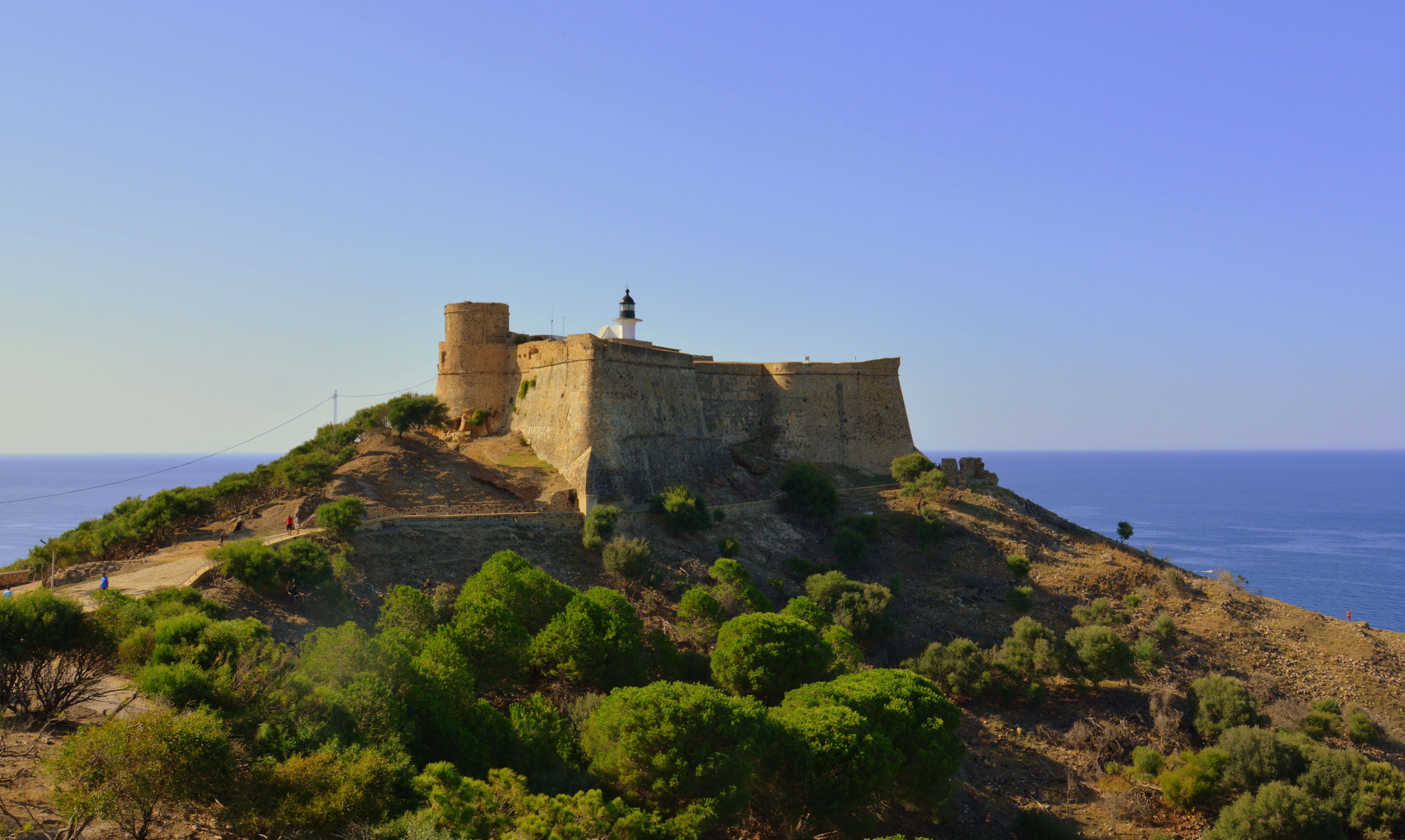 Fort de l'île de Tabarka